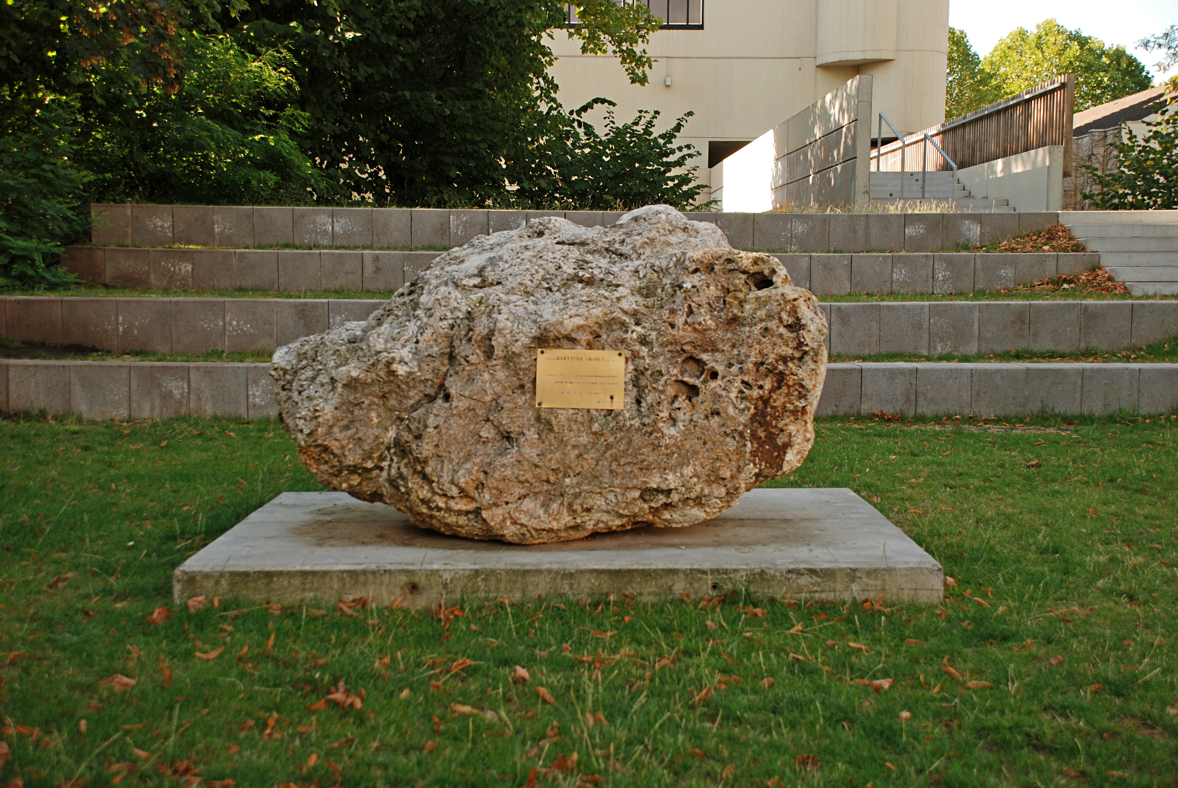 Belgique - Brabant wallon - Louvain-la-Neuve - Place Louis Pasteur - Bloc de barytine